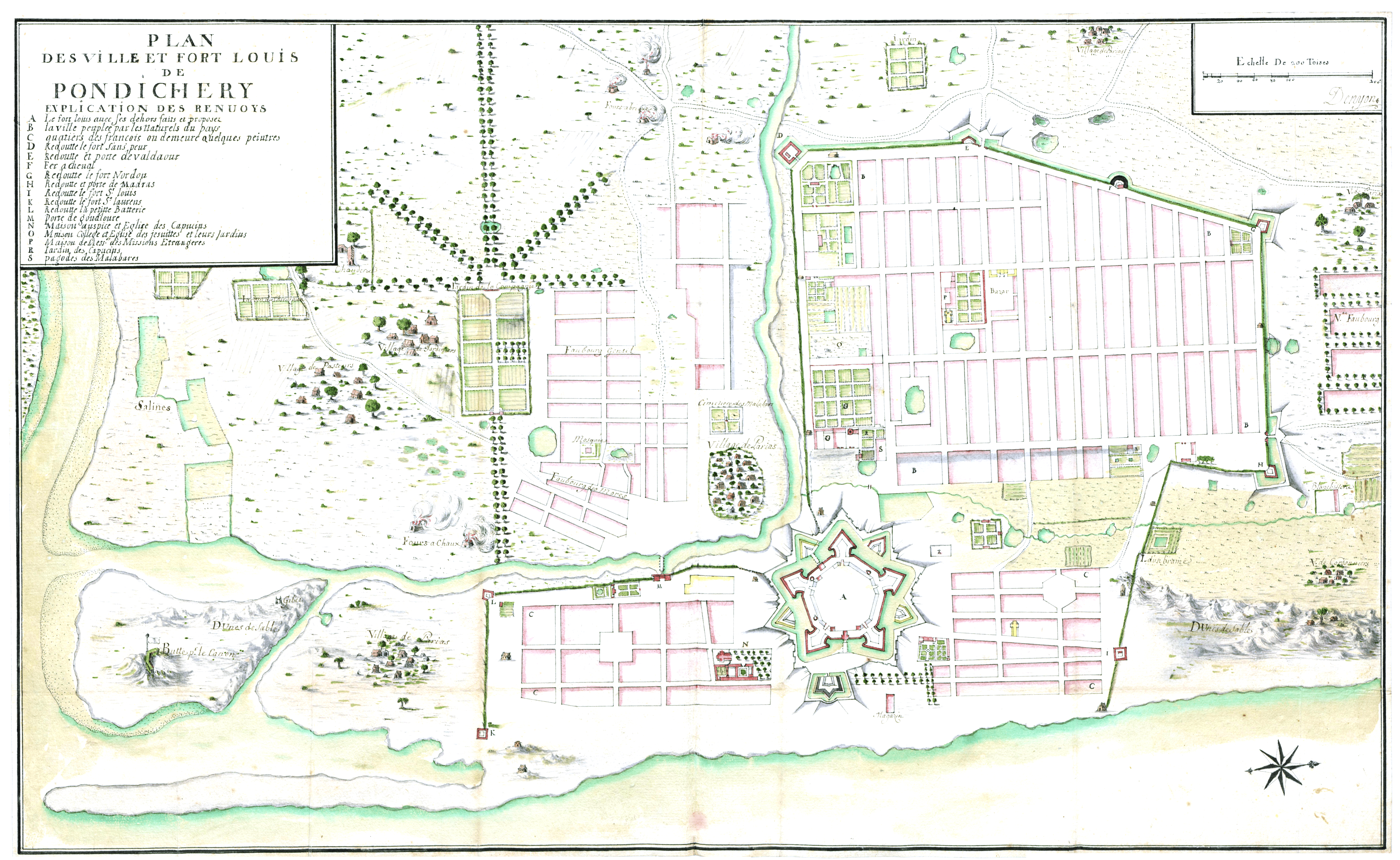 Plan des ville et fort Louis de Pondichéry par M. Denyon